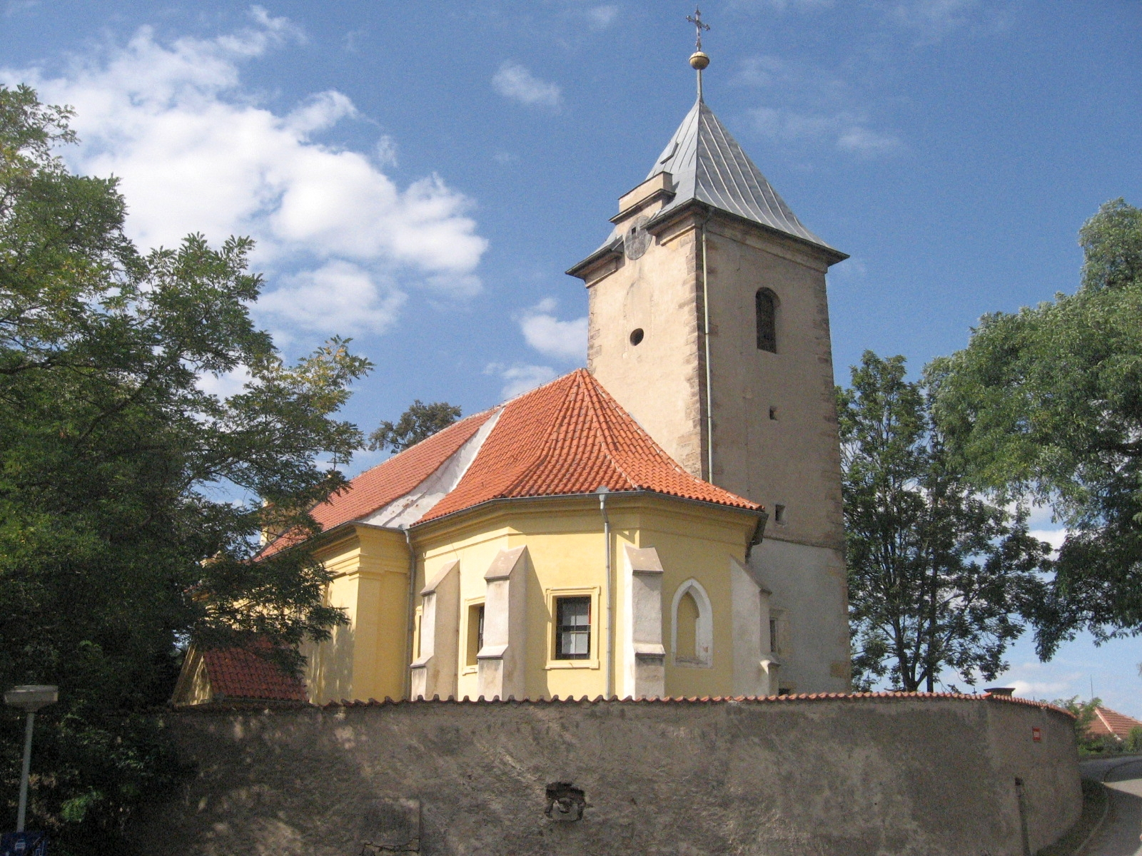 Kostel sv. Jakuba Většího (Kralupy nad Vltavou), Pražská, Minice, Kralupy nad Vltavou